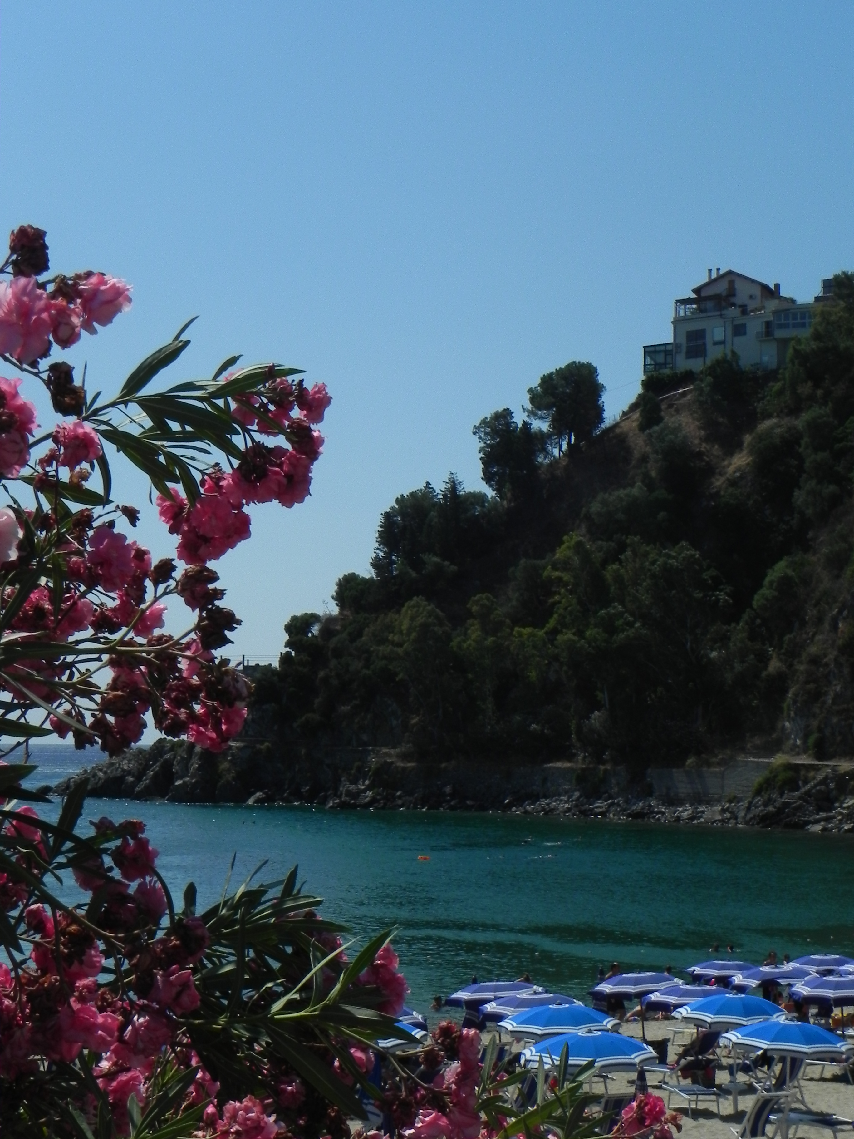 Con oleandro